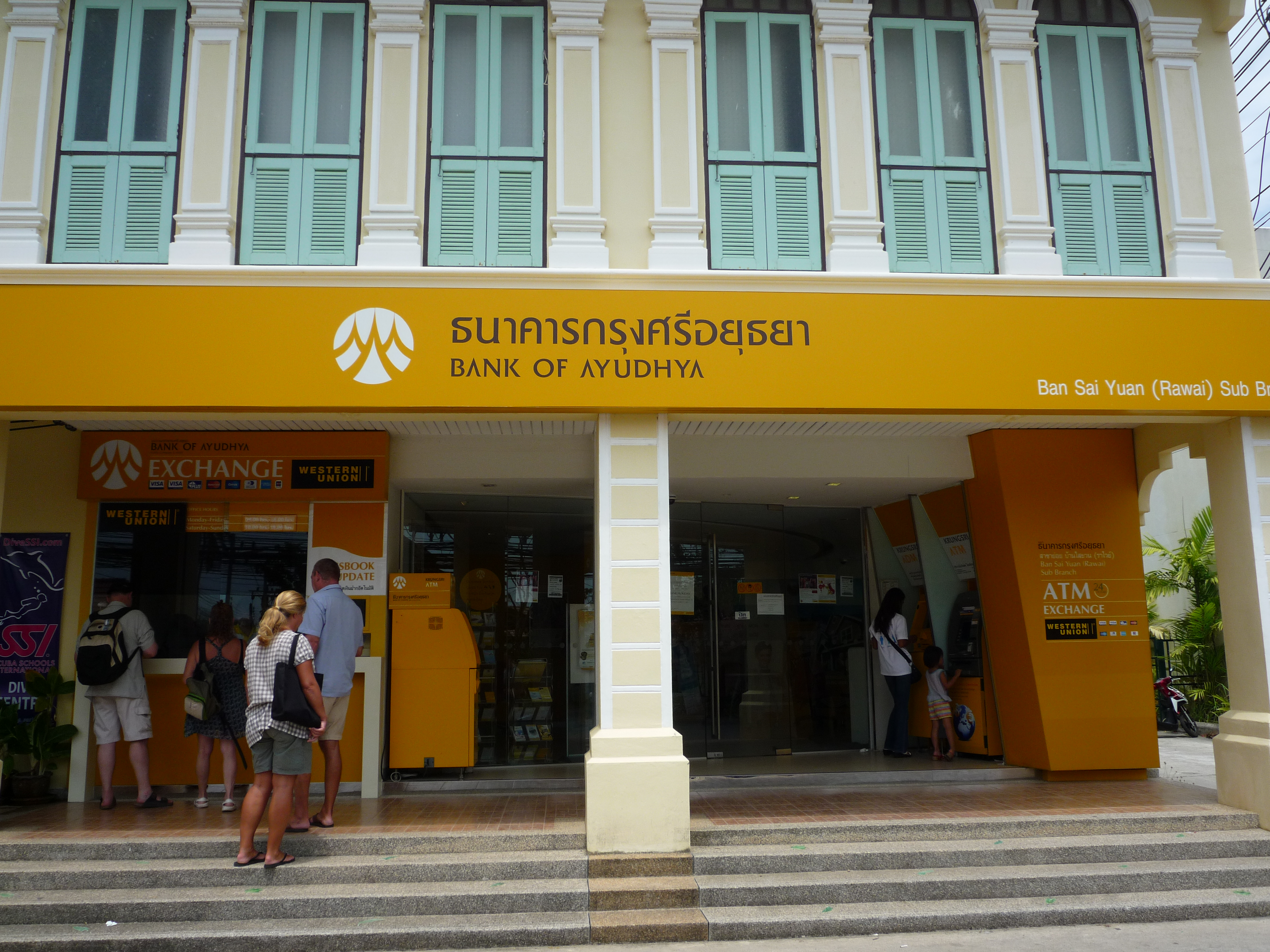 Zweigstelle der Bank of Ayudhya (ธนาคารกรุงศรีอยุธยา), Ban Sai Yuan (Rawai), Phuket, Thailand